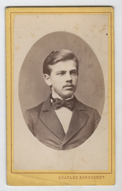 Portree: Christfried Hörschelmann